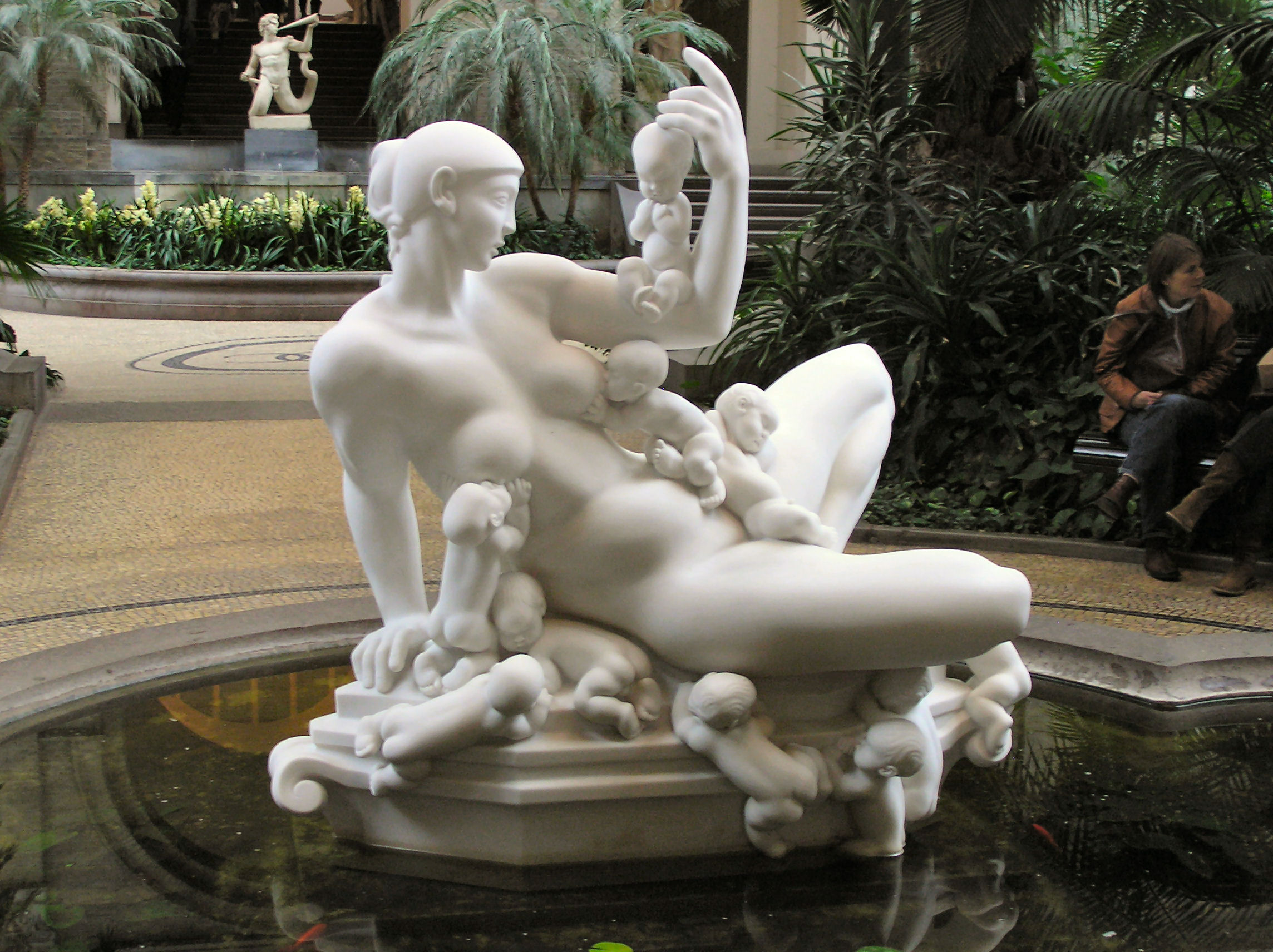 Vandmoderen af Kai Nielsen, Glyptoteket